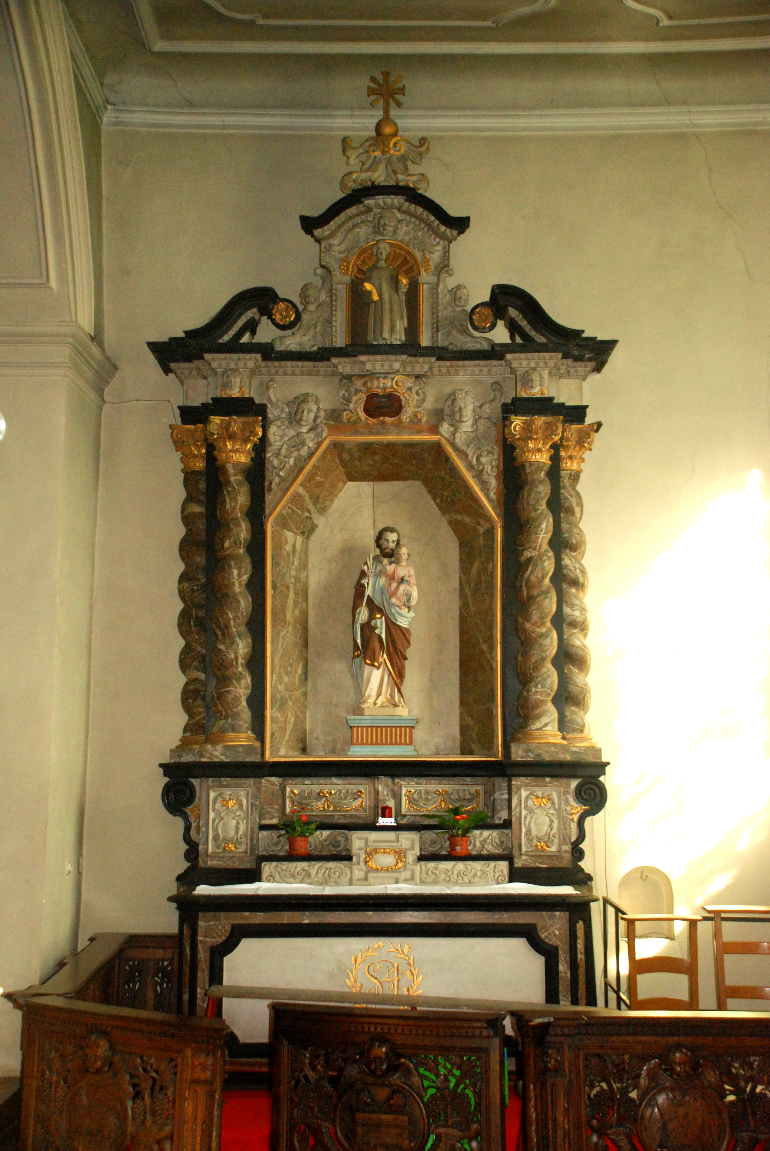 Belgique - Brabant wallon - Ottignies - Église Notre-Dame de Mousty